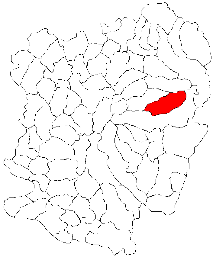 Categorie:Hărţi ale judeţului Caraş-Severin